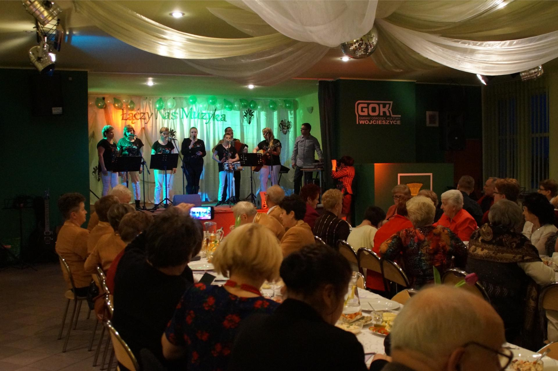 Spotkanie zespołów amatorskich w GOK